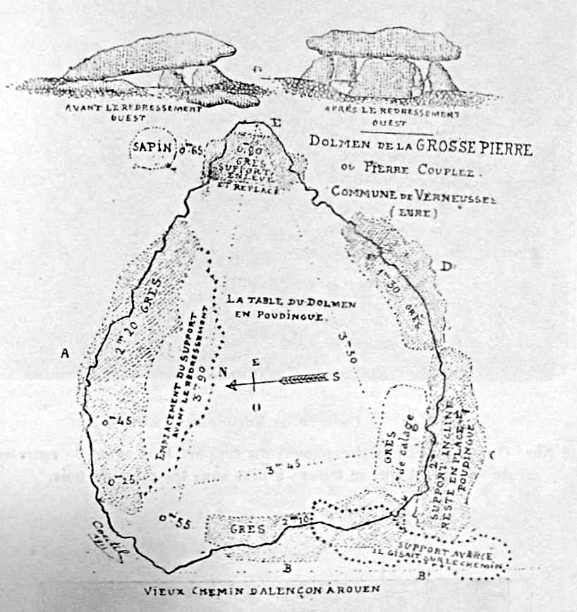 Vue en plan des différentes étapes de l’opération de redressement du dolmen de la Grosse Pierre à Verneusses par Léon Coutil en 1910-1911